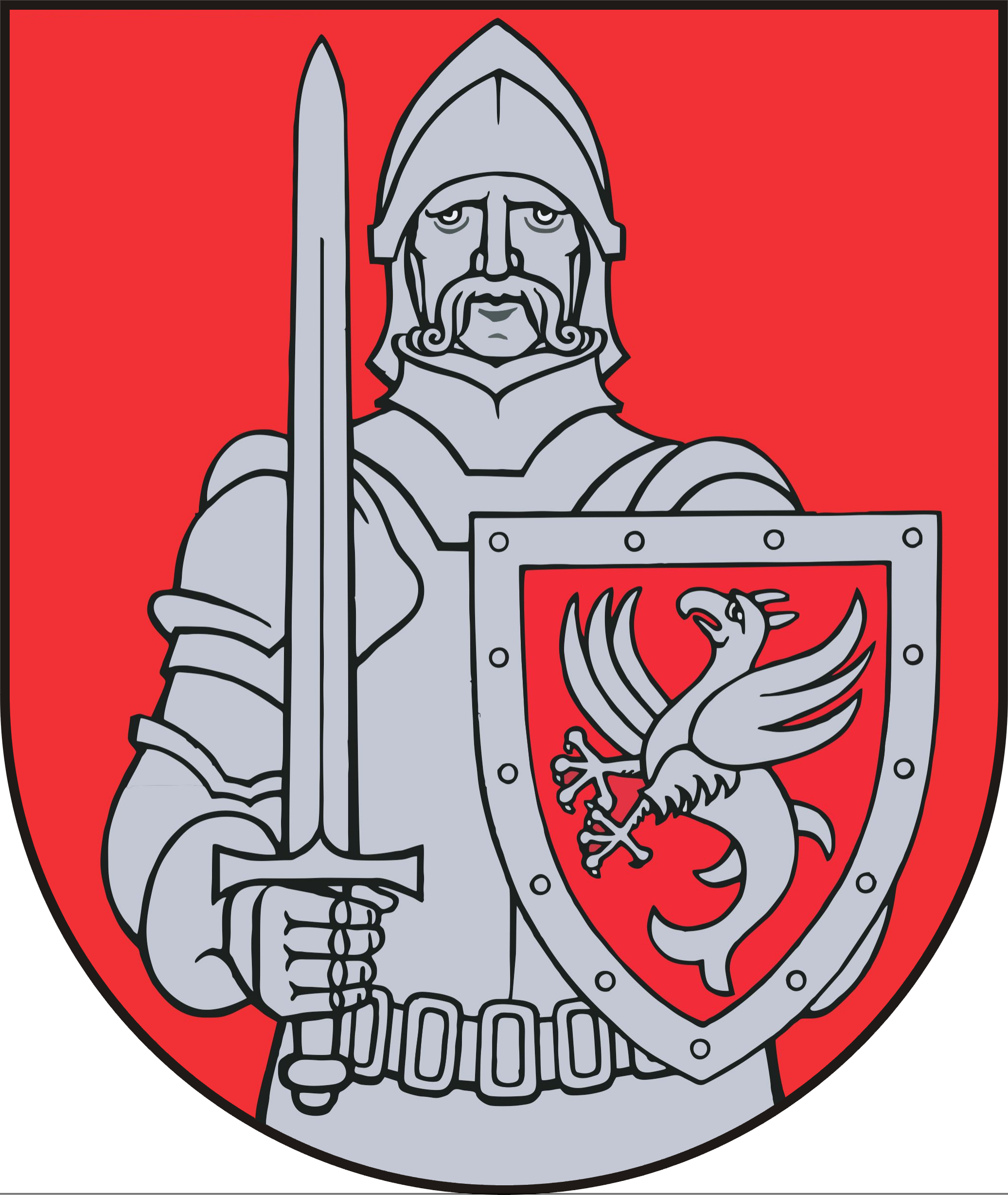 Herb gminy Tuchomie